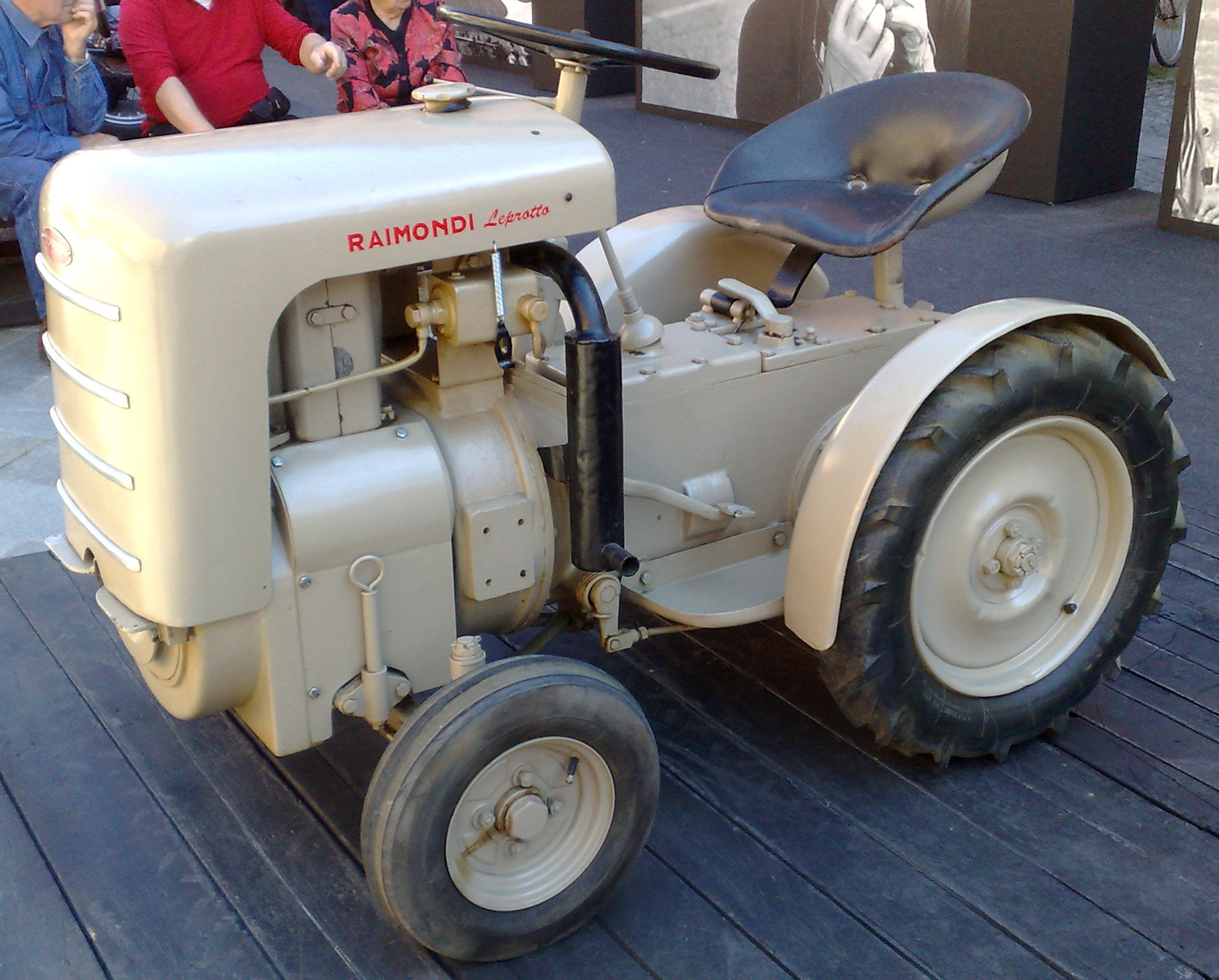 R.C. Leprotto (1950 circa)